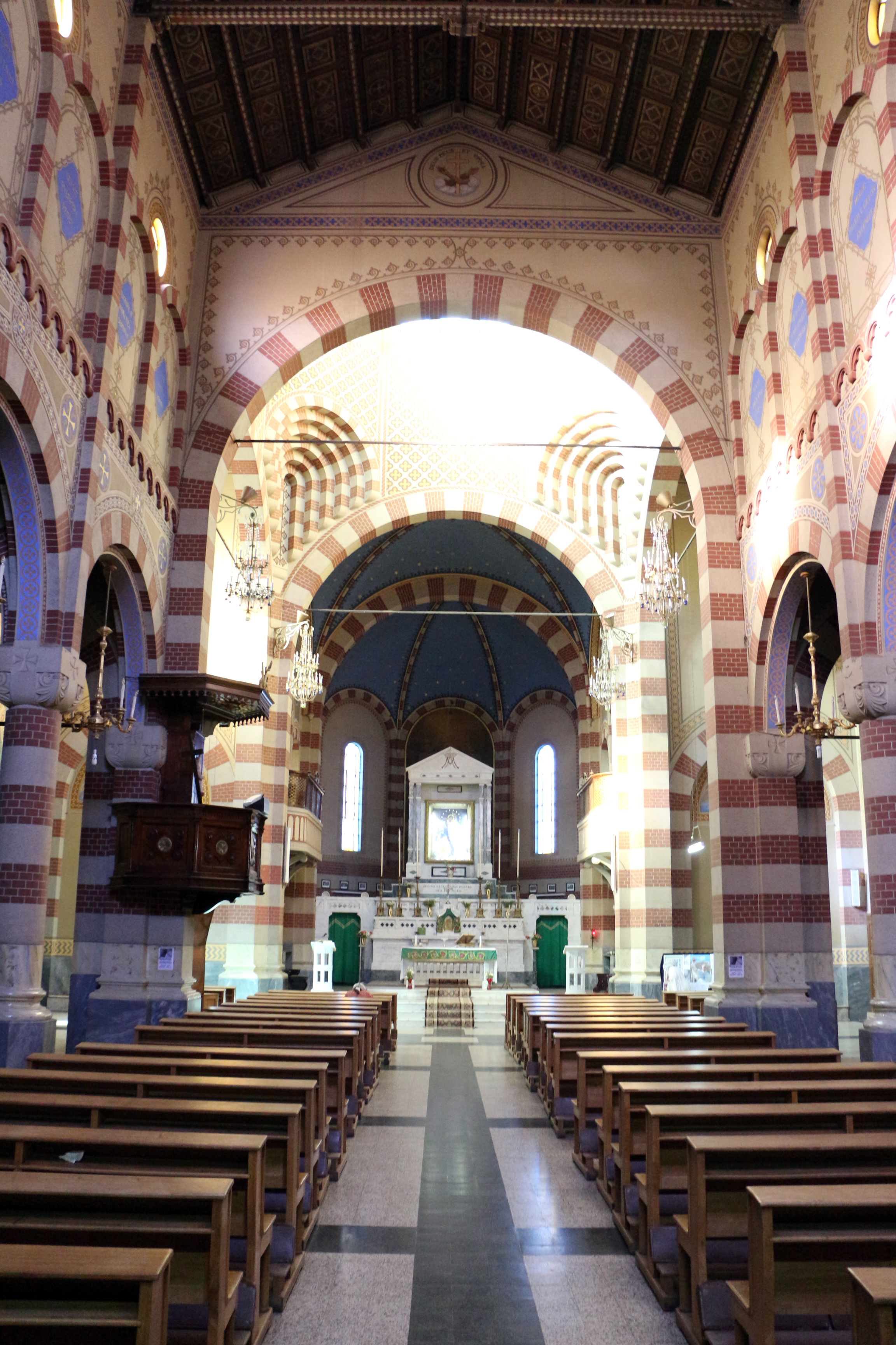 Asmara, cattedrale cattolica, interno 01.JPG